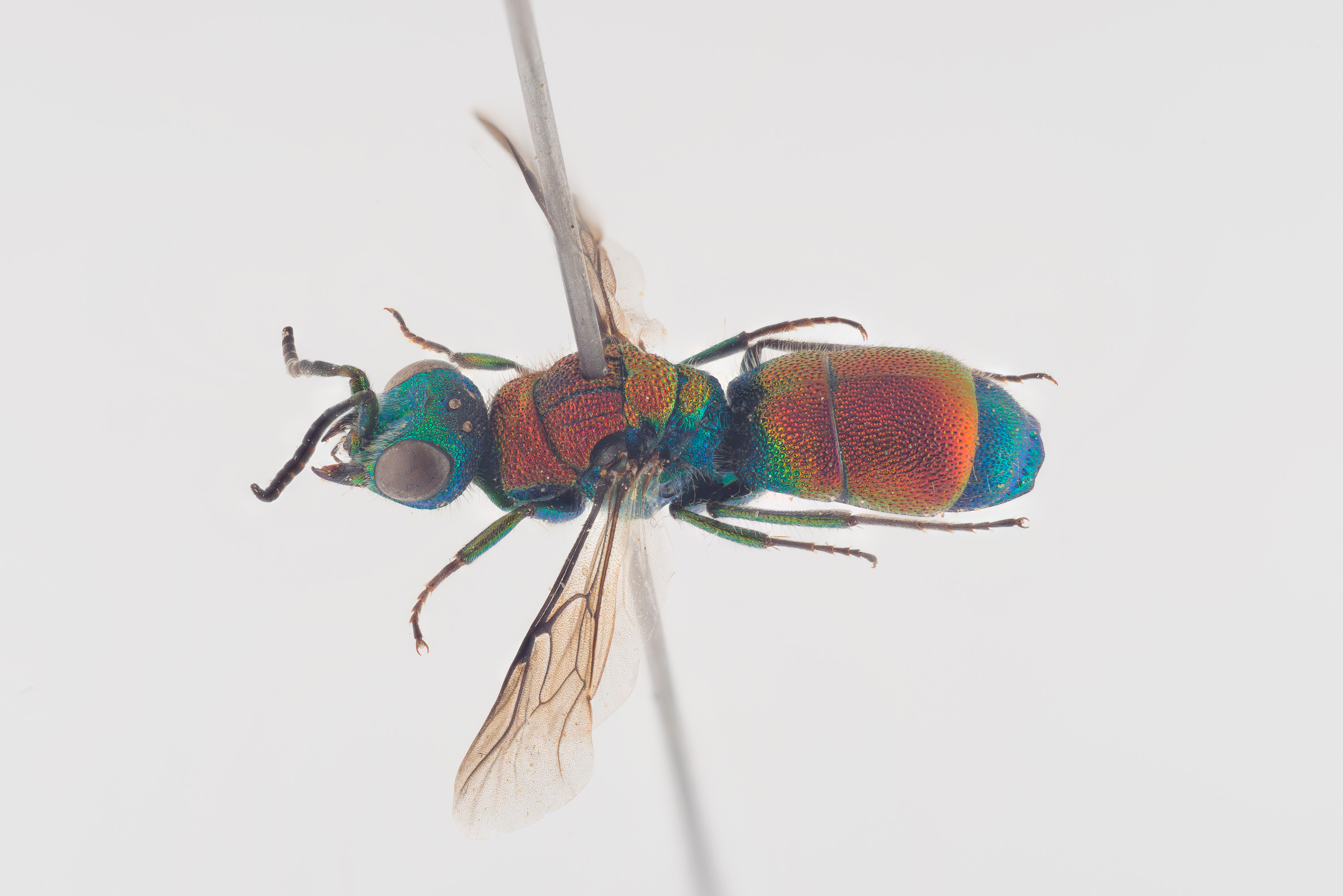 Flammegullkvefs (Chrysis viridula)